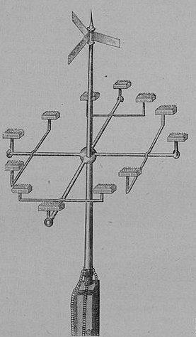 Prokop Diwischs Blitzableiter, Fig. a